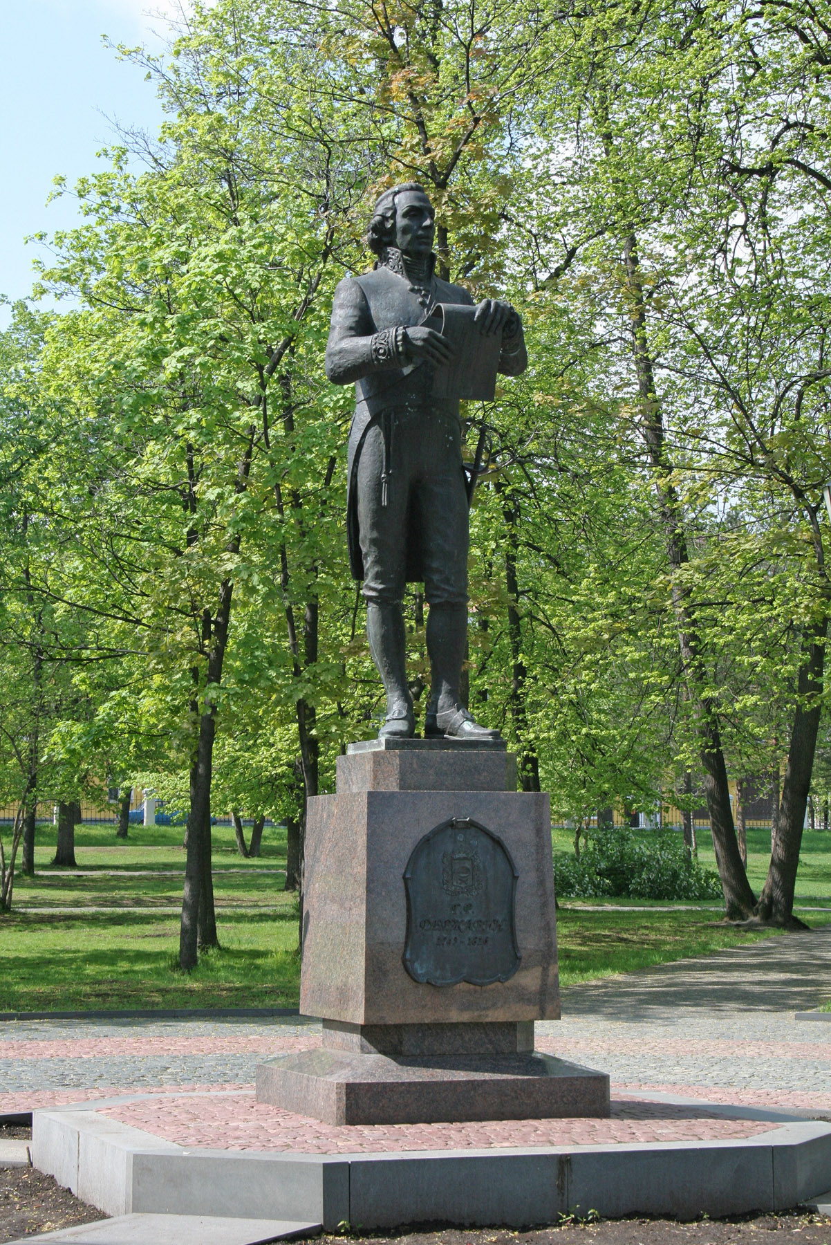 Памятник Г. Р. Державину в Губернаторском парке. Петрозаводск. (скульптор Вальтер Сойни)